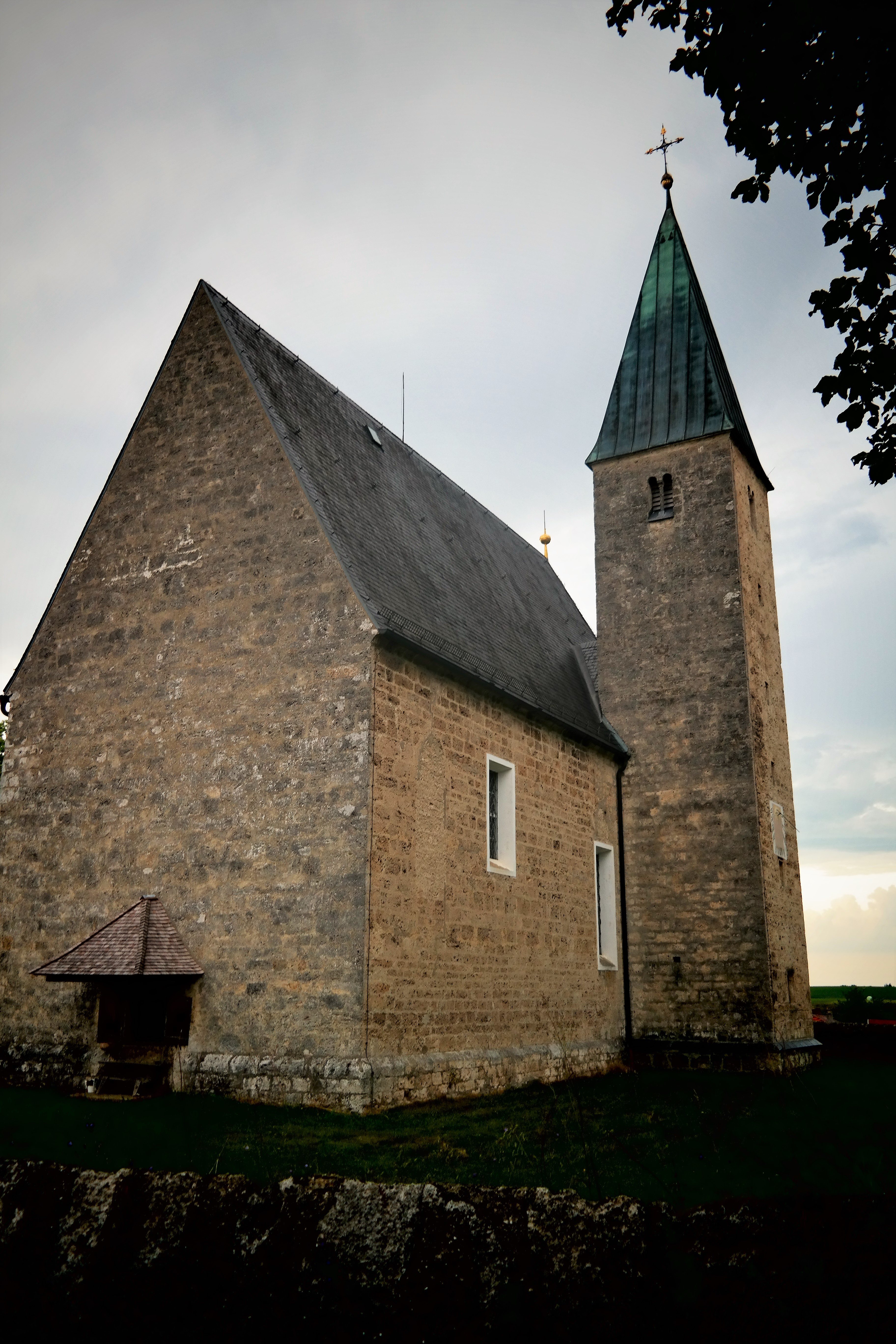 Katholische Filialkirche St. Pankratius